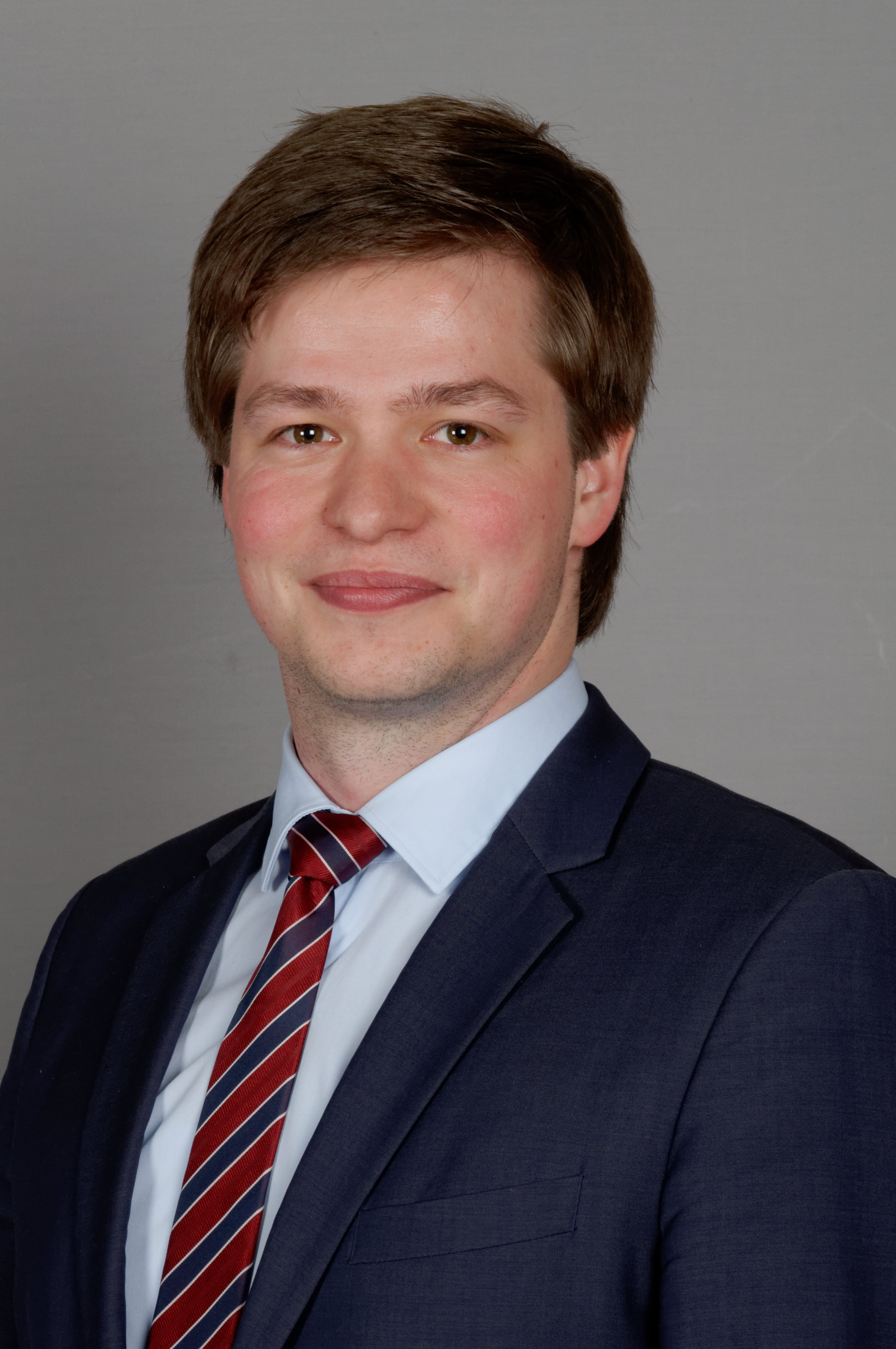 Philipp da Cunha, MdL Mecklenburg-Vorpommern